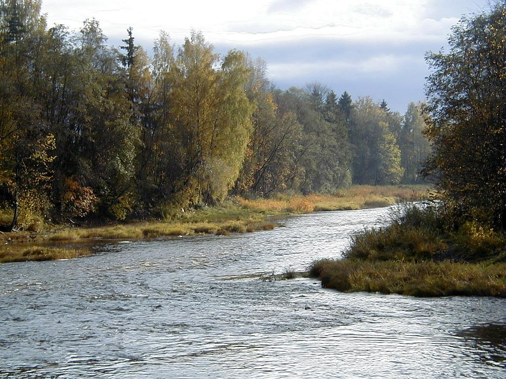 Ogres upe pie Ogres 1999-10-14